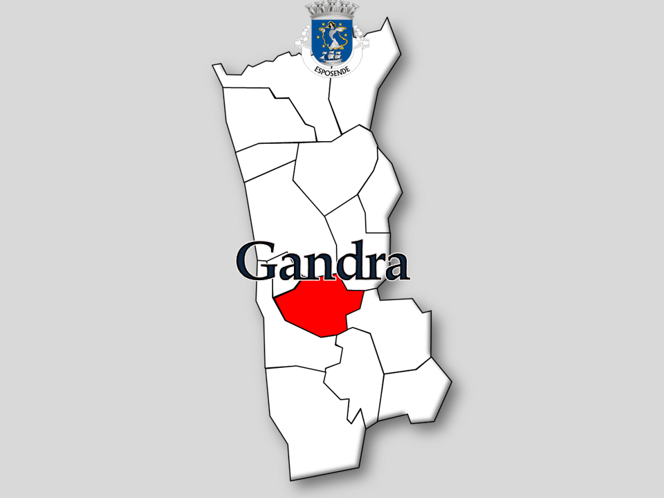 Censos 1864/2011